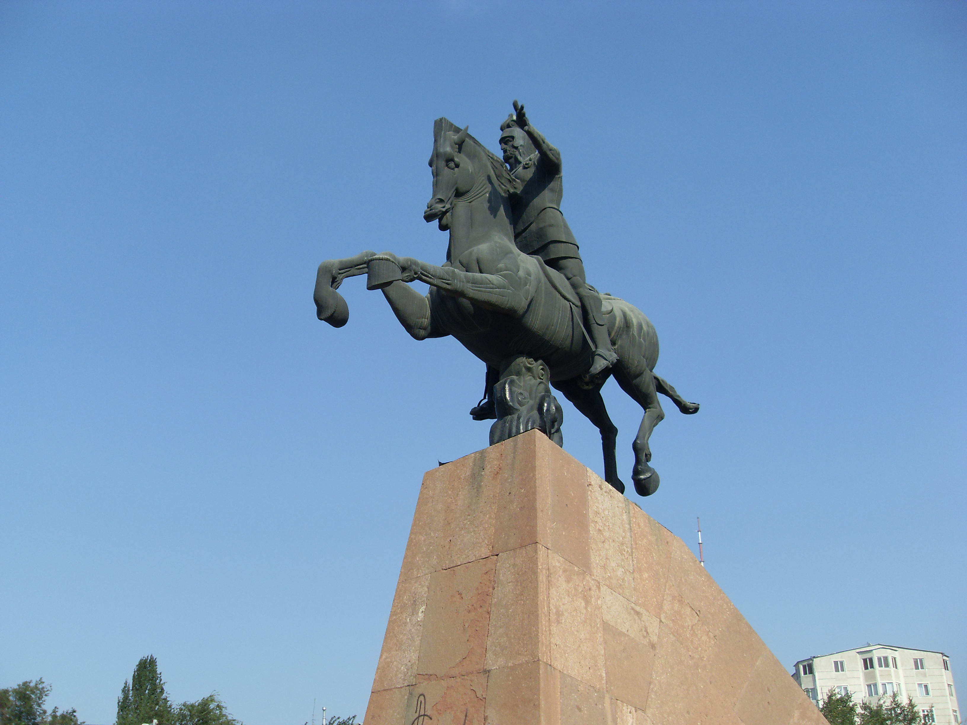 Վարդան Մամիկոնյանի հուշարձան, 1975 թ., Օղակաձև զբոսայգի քանդ.` Երվանդ Քոչար, ճարտ.` Ս. Քյուրքչյան